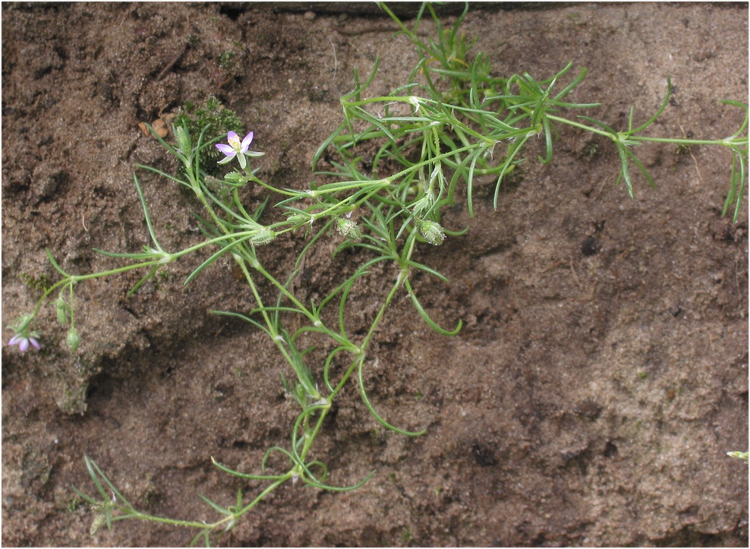 Rode schijnspurrie Spergularia rubra